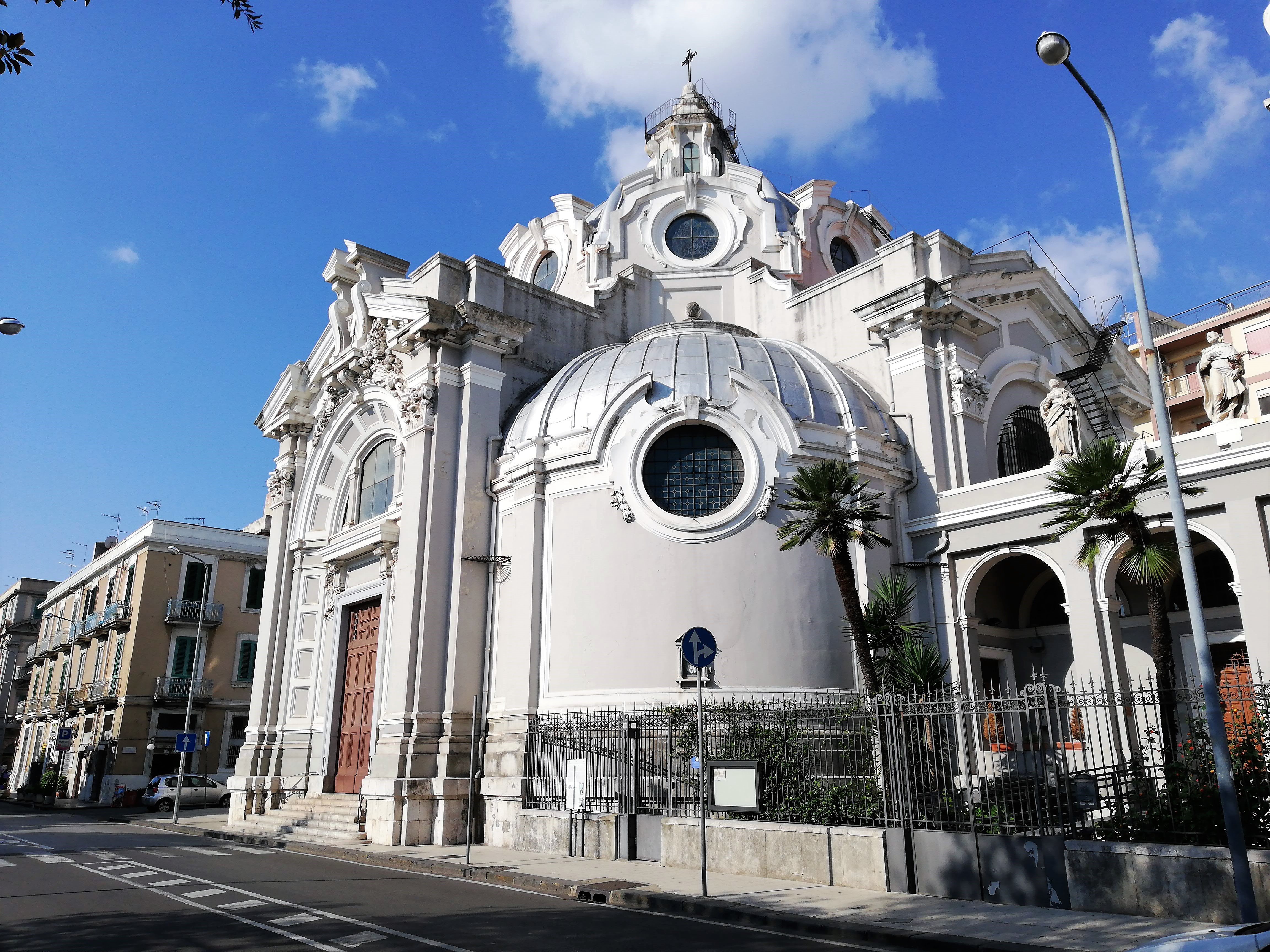 Portale.